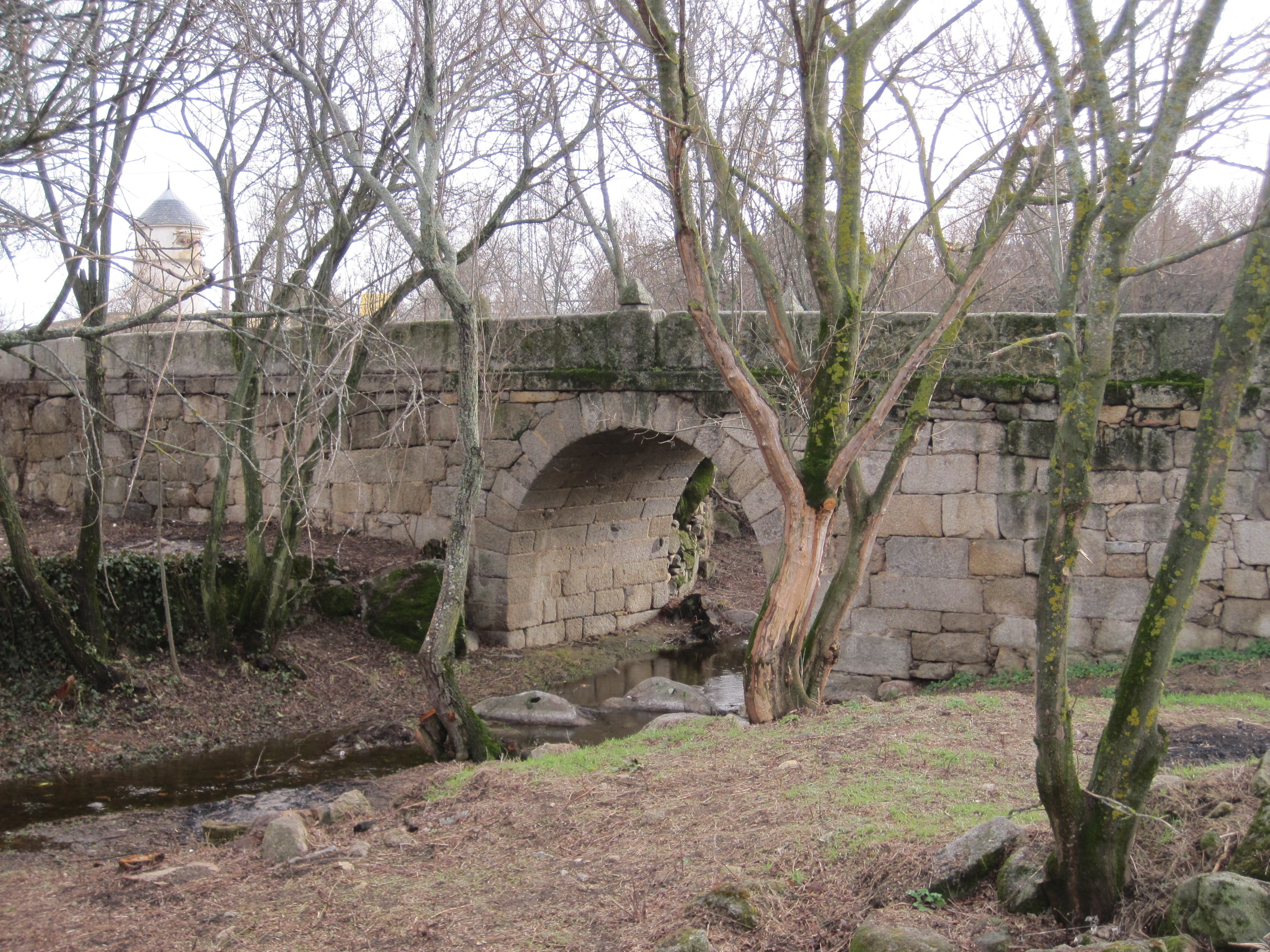 Puente de origen romano en la localidad de El Escorial (Madrid, España).